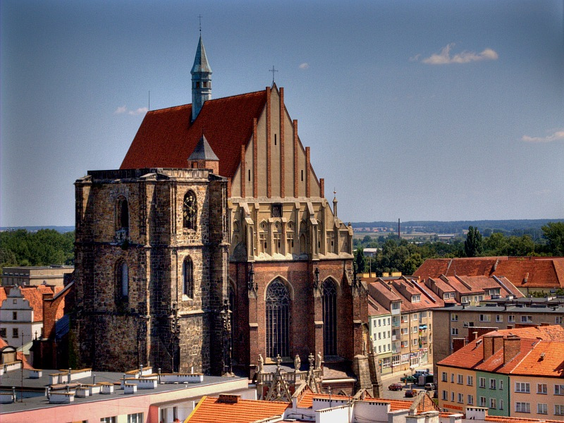 Katedra i dzwonnica w Nysie